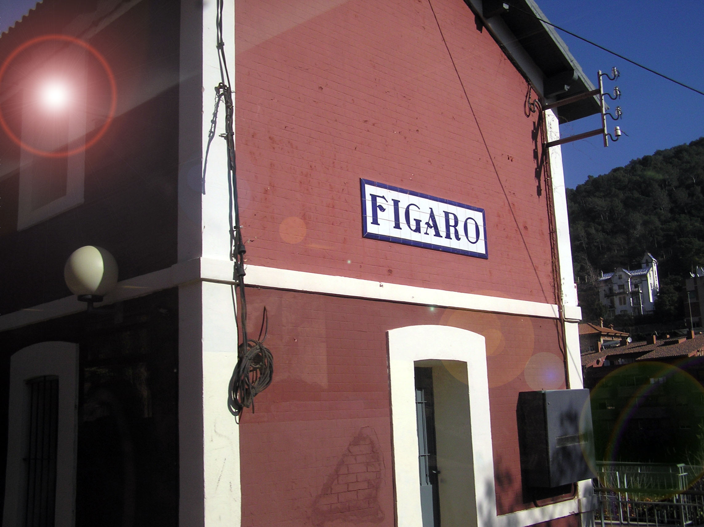 Estación de RENFE de Figaró, en la línea Barcelona-Tour de Carol